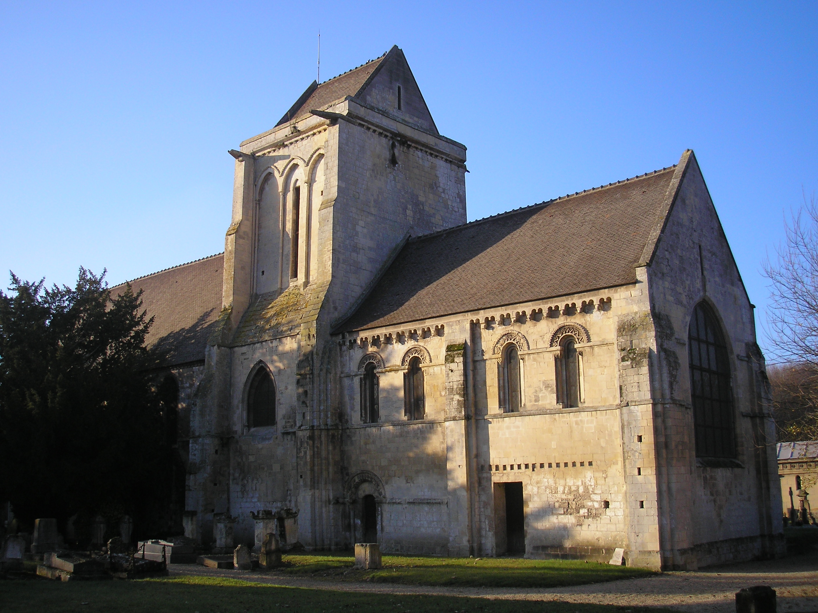 Façade méridionale de l'église Notre-Dame-des-Prés, dite la Vieille église, à Mondeville (Calvados, France).